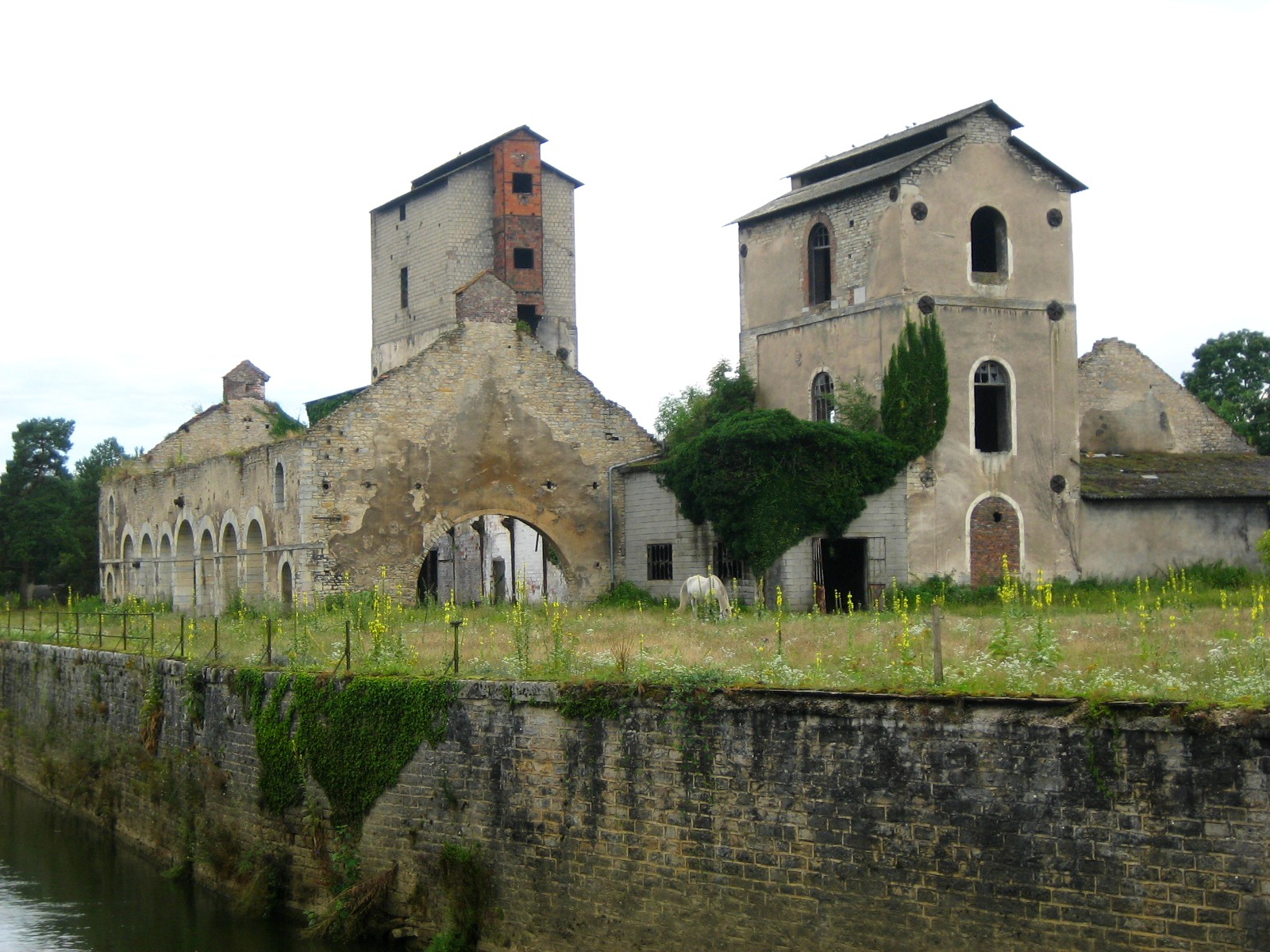 Forges de Rans, Jura, France